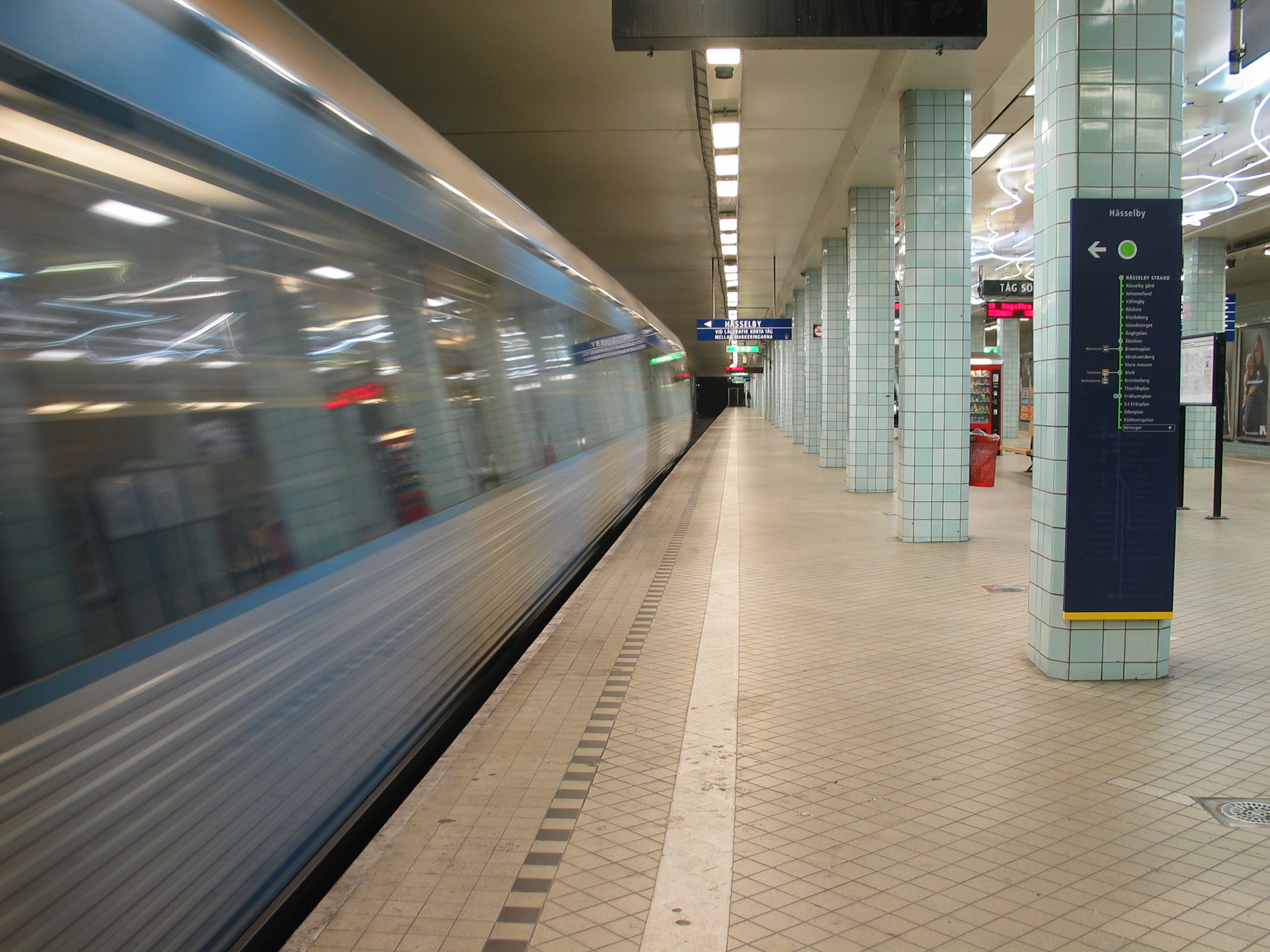 Hötorget, a metro station in Stockholm, Sweden.